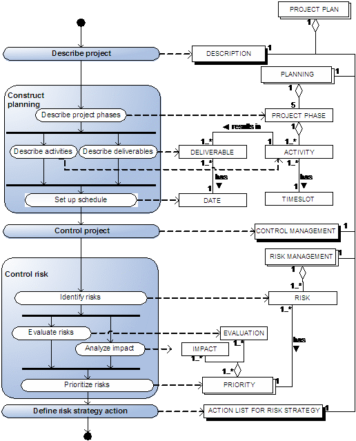 Process-Data Diagram